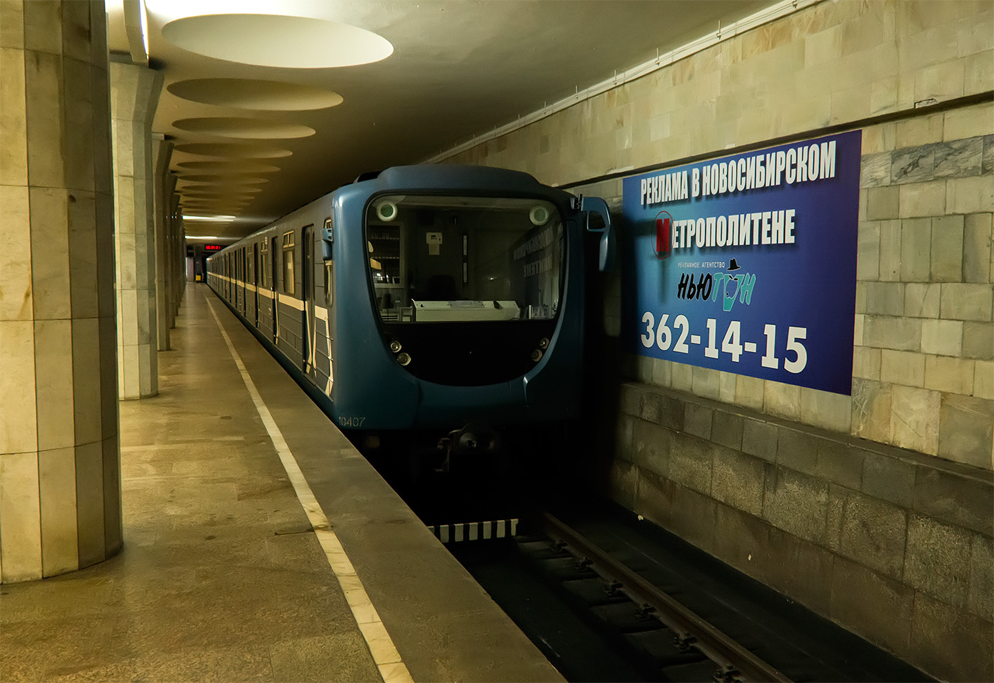 Электропоезд метрополитена 81-540.2Н/541.2Н на станции Площадь Гарина-Михайловского Новосибирского метрополитена